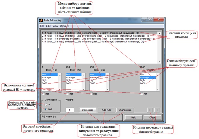 Matlab